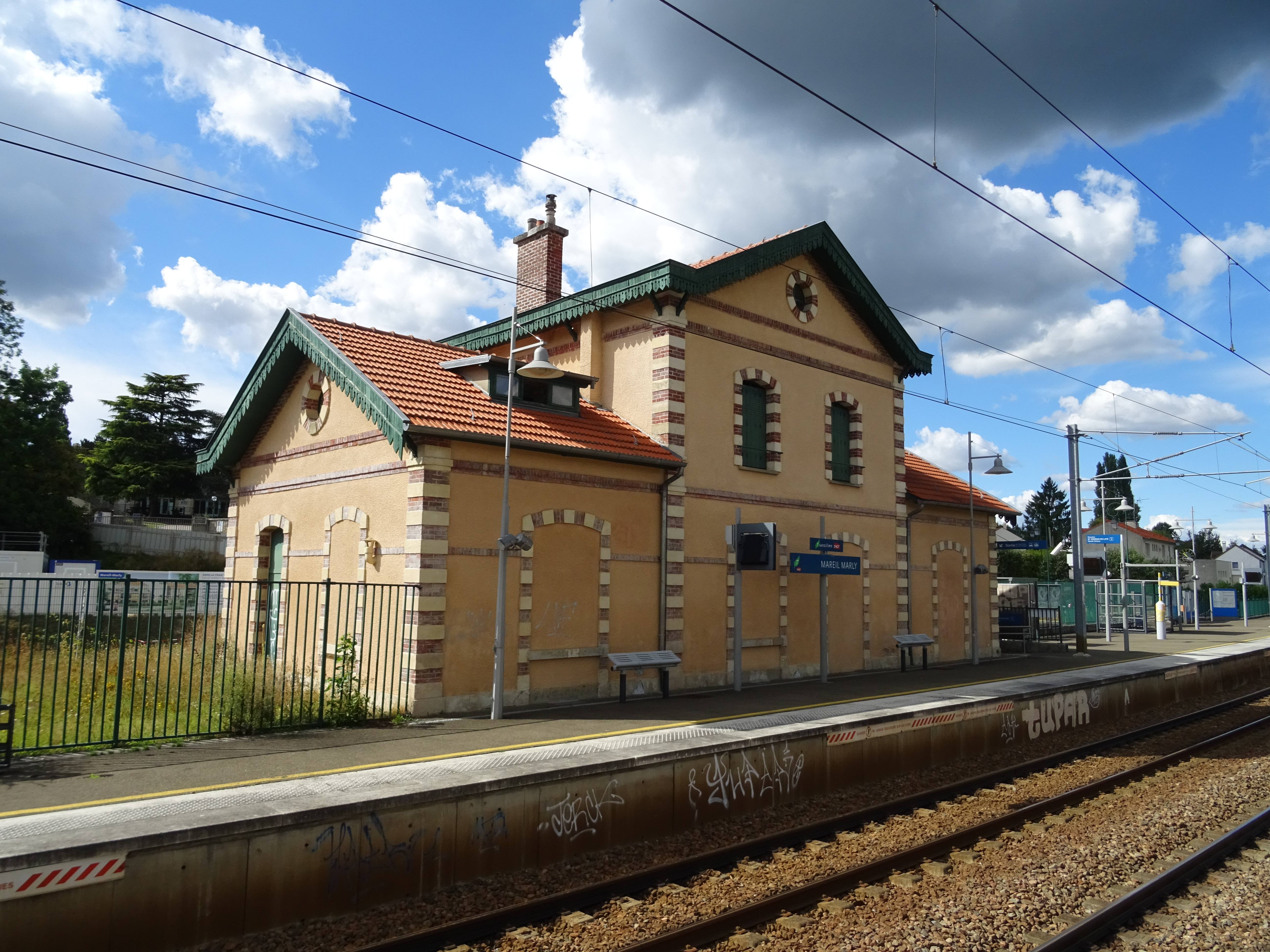 Bâtiment voyageurs de la gare de Mareil-Marly vu depuis le quai pour Noisy-le-Roi